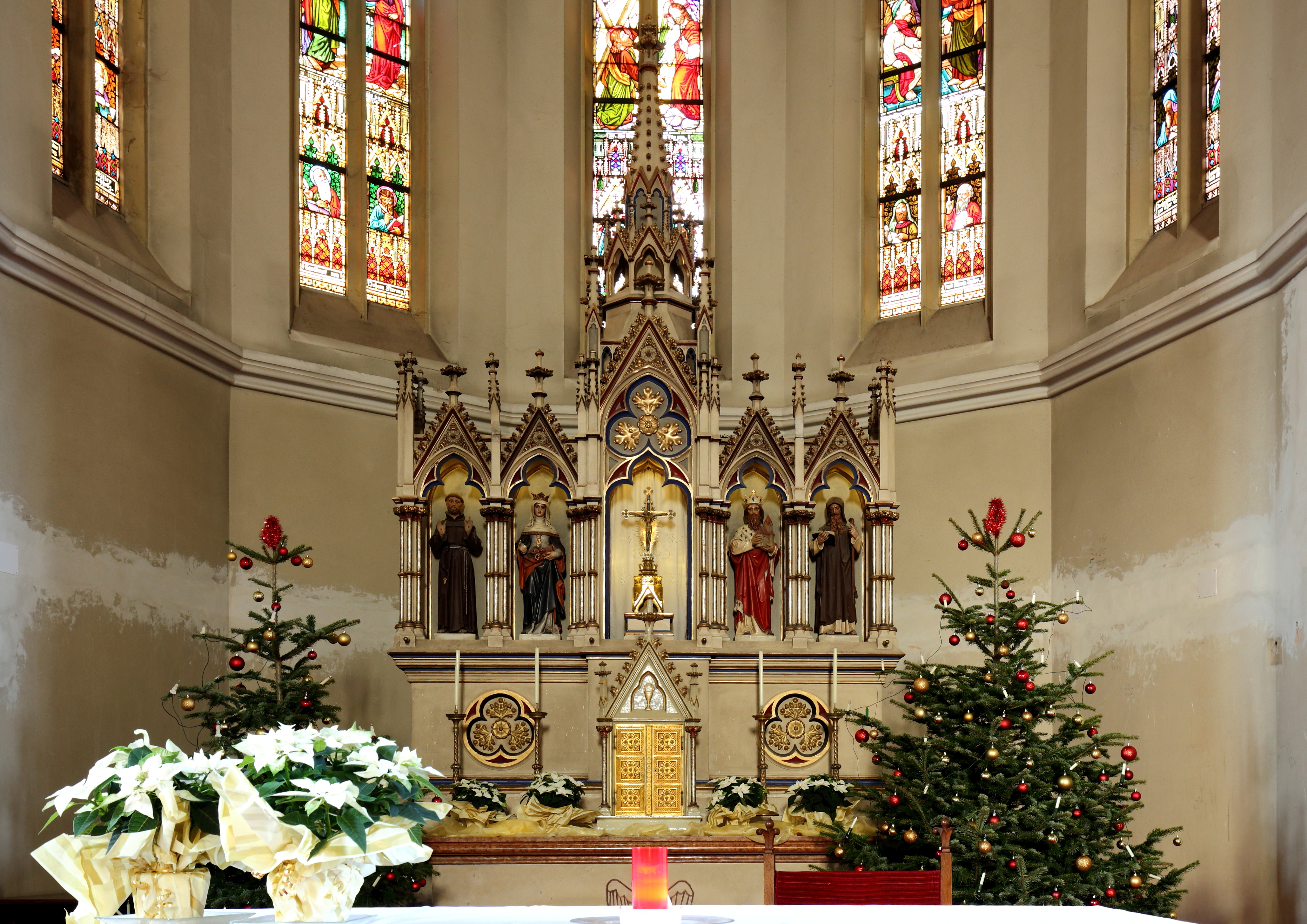 Hochaltar der röm.-kath. Pfarrkirche hl. Andreas im 14. Wiener Gemeindebezirk. Ein Werk von Rochus Haas aus den Jahren 1881/82.